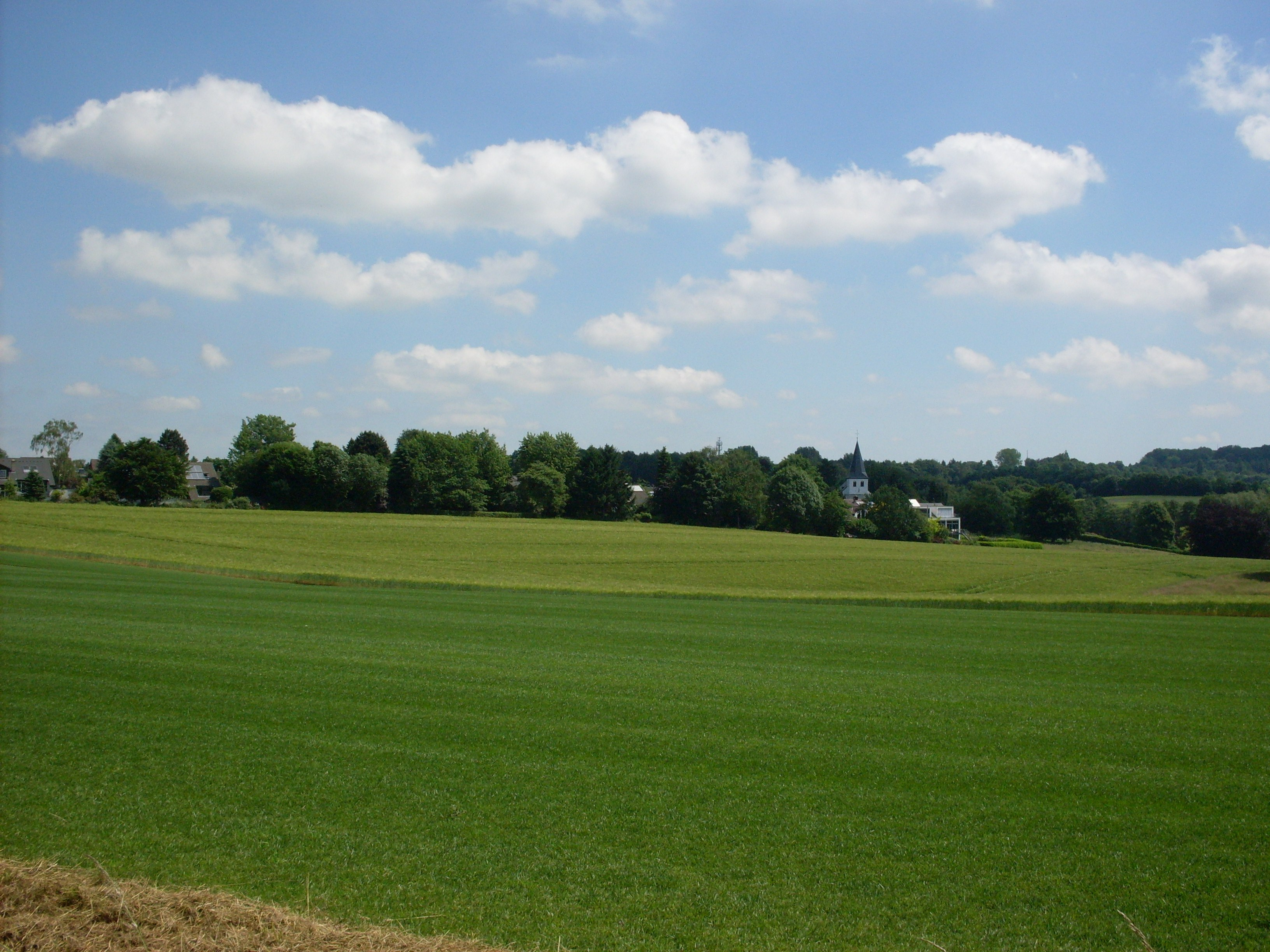 Düsseldorf-Hubelrath Dorf Hubbelrath, Blick von der Erkrather Landstraße